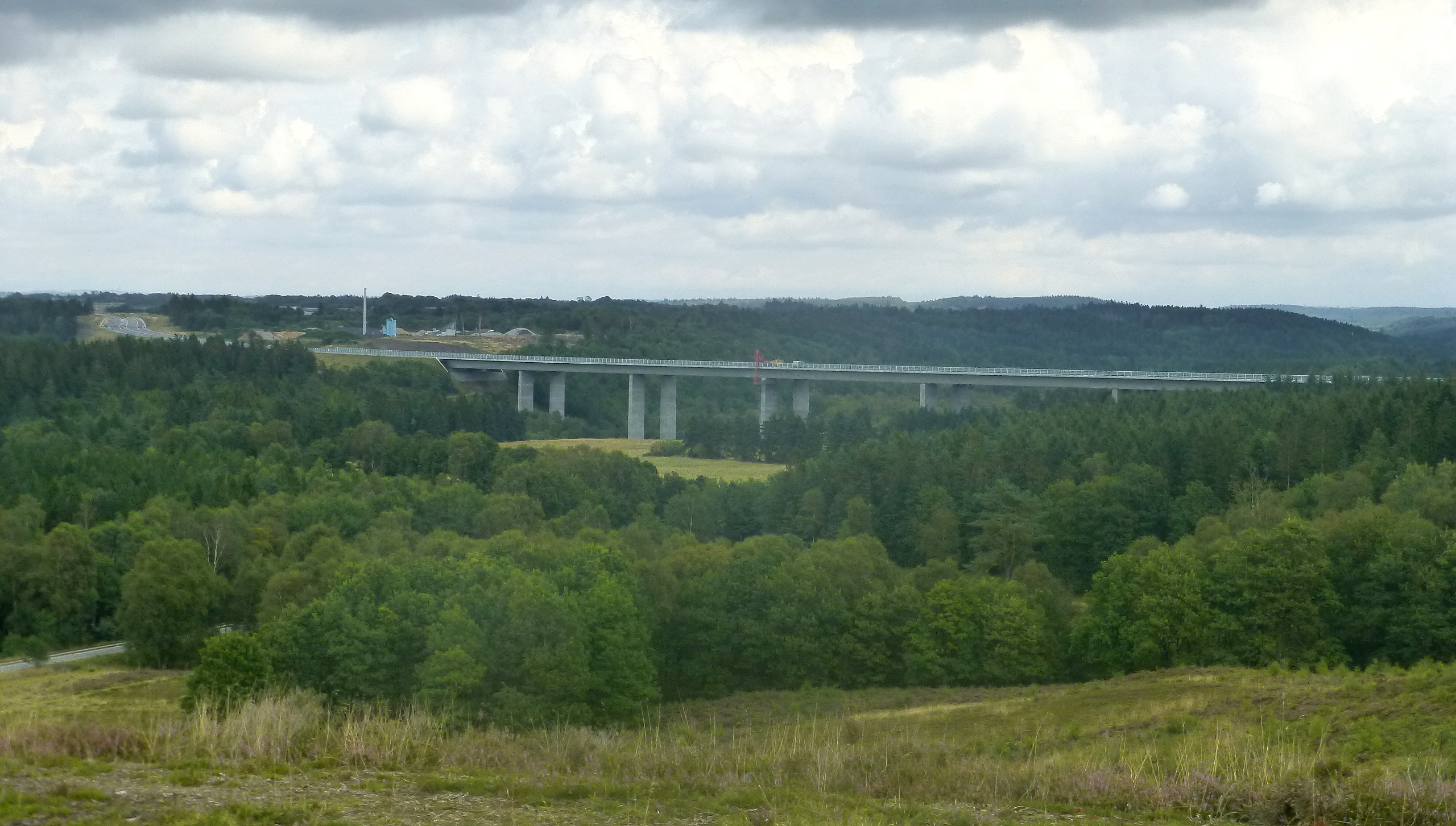 Hørbylundebroen over Funder Ådal på Herningmotorvejen